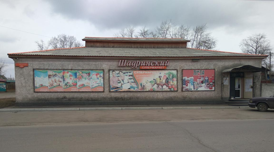 Магазин на Шадринке в городе Черемхово Иркутской области по улице Свердлова. В СССР назывался промтоварный магазин № 8.